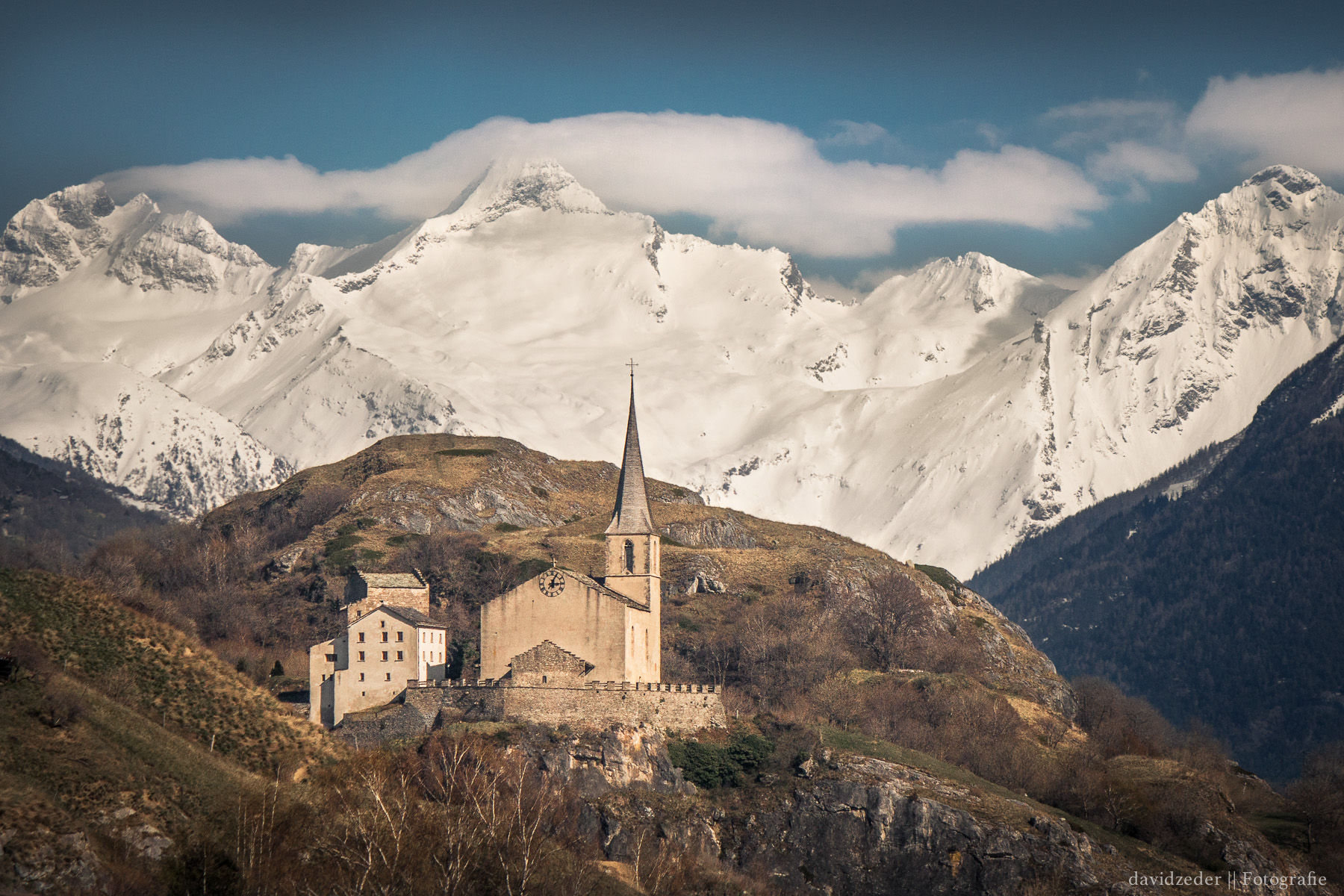 Kirche St.Roman mit altem Pfarrhaus